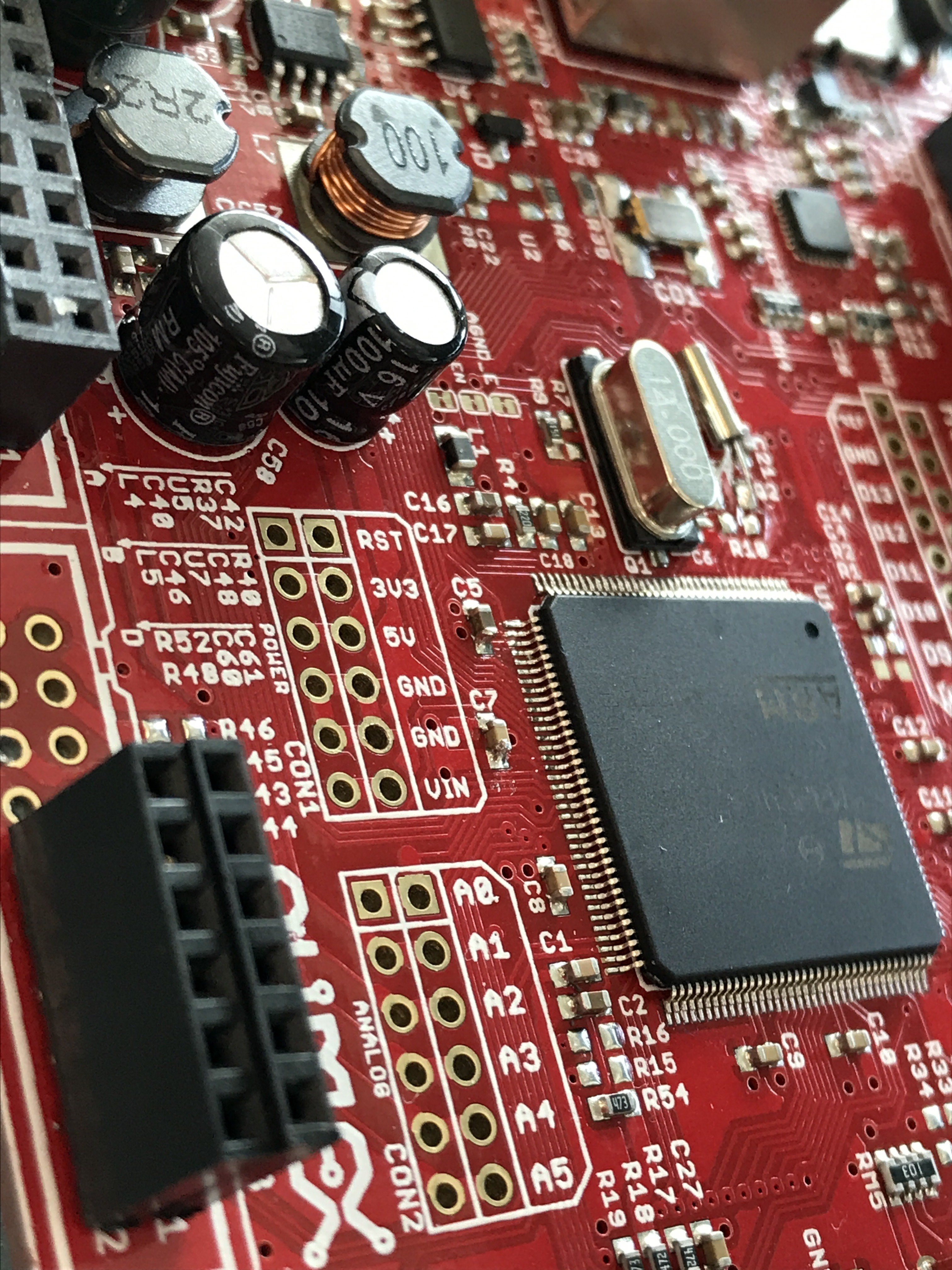 1. irudia - Plaka Elektronikoa.